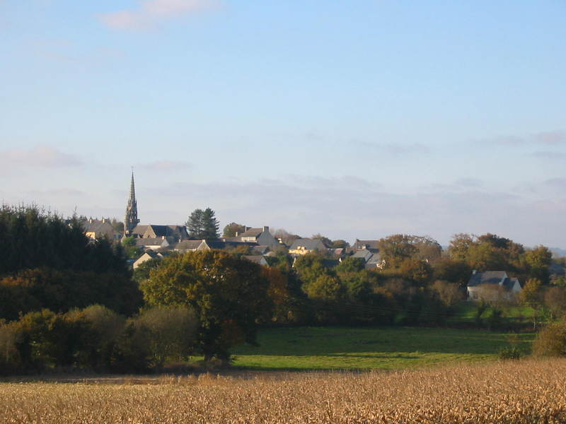 Le bourg du Cloitre